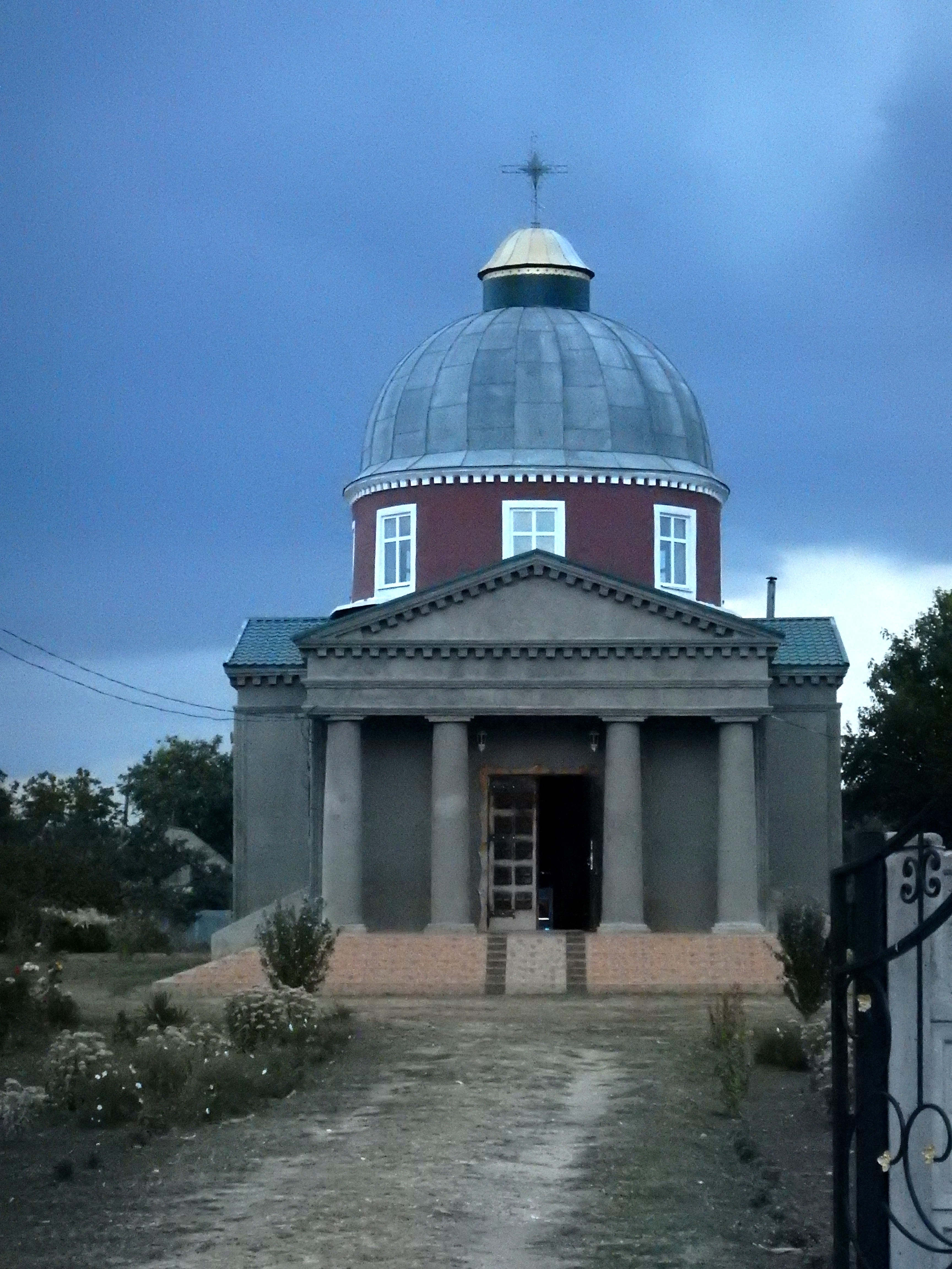 Храм Святої Преподобної Мучениці Анастасії Римлянки (Новопетрівка, Великомихайлівський район 1825 рік, відреставровано 1991 рік) Вікіекспедиція на Північ Одещини